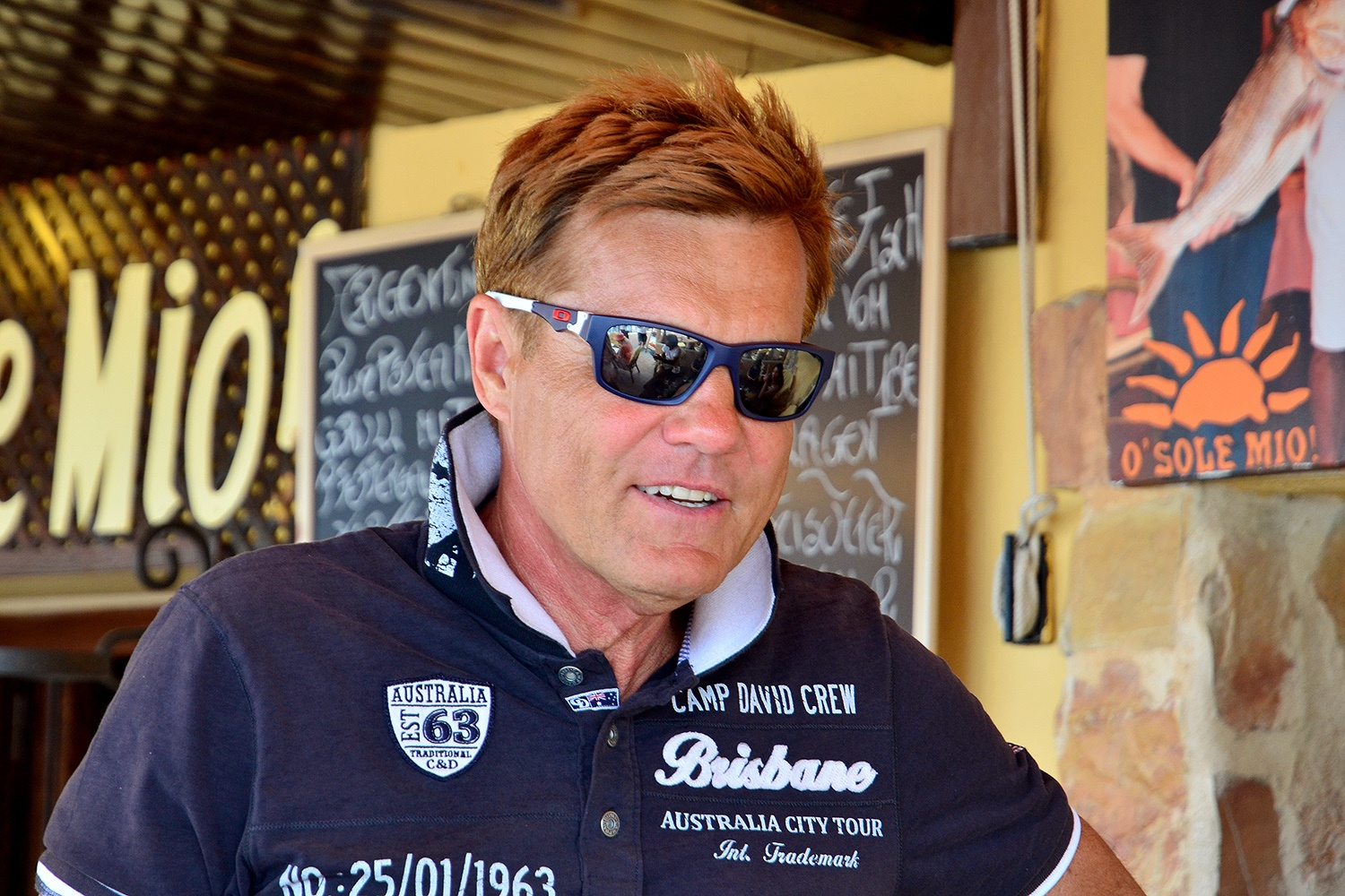 Dieter Bohlen in Cala Ratjada, Juni 2013